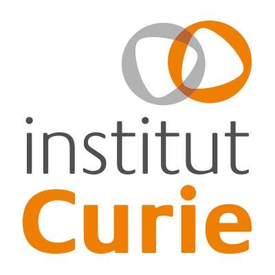 Logo Institut Curie